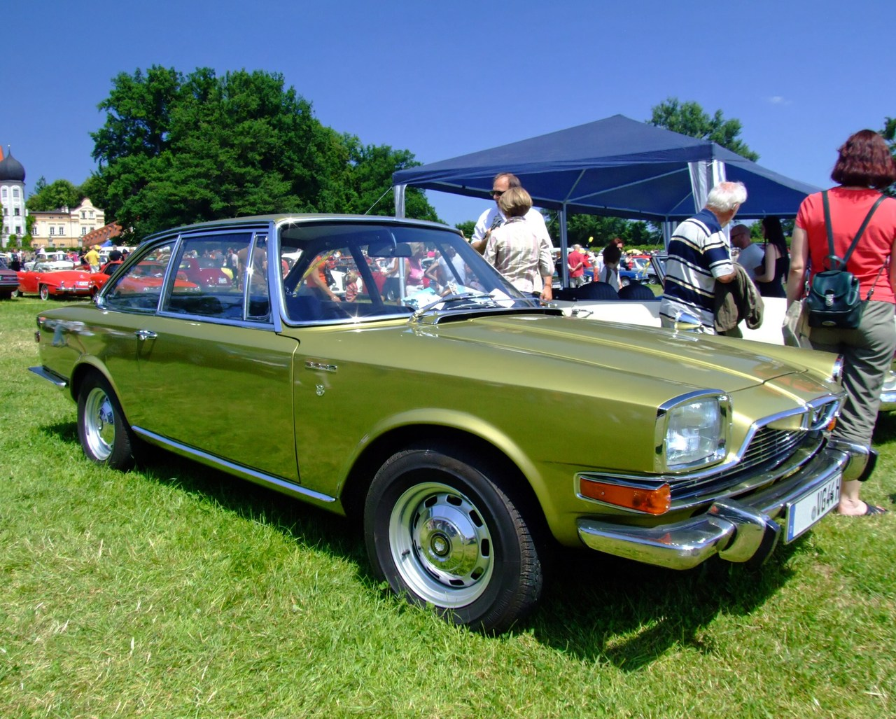 Quelle: selbst fotografiert, 06/2007 Fotograf: Späth Chr.